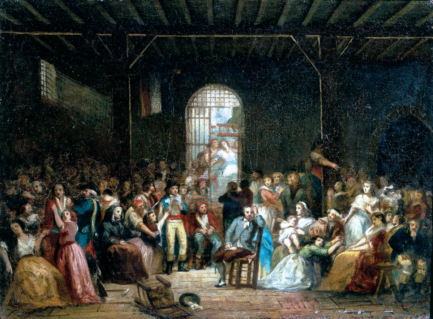 Appel des dernières victimes de la Terreur à la prison Saint Lazare - Tableau de Charles-Louis MULLER